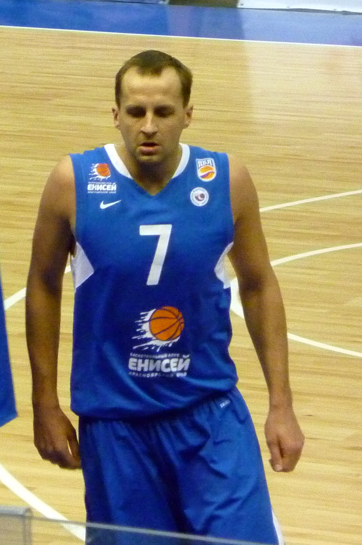 Защитник красноярского Енисея Андрей Комаровский в матче против БК «Нижний Новгород» 18 декабря 2010 года